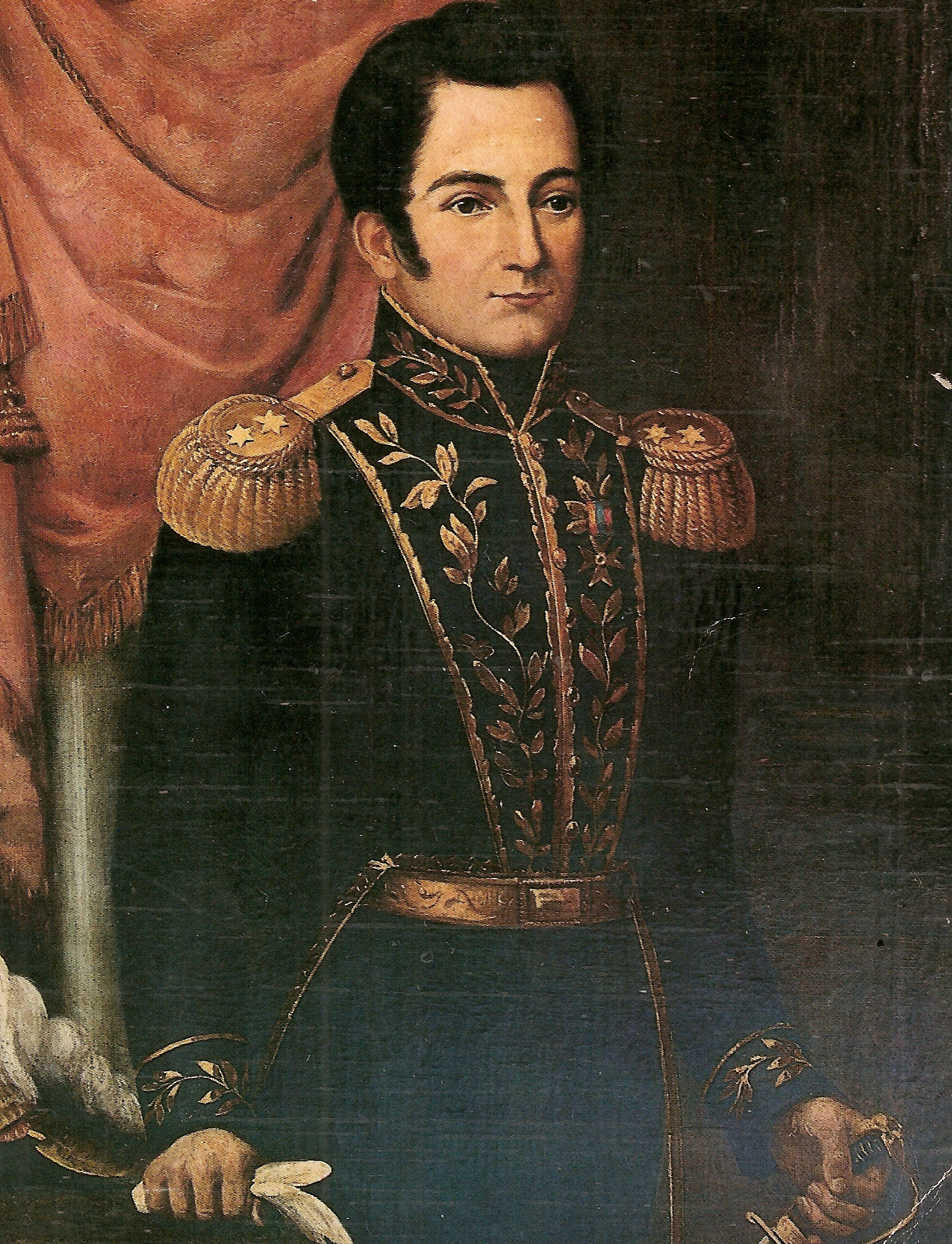 Retrato de Mariano Montilla. 1874. Oleo sobre tela. Colecion del Ministerio de Relaciones Exteriores. Caracas.